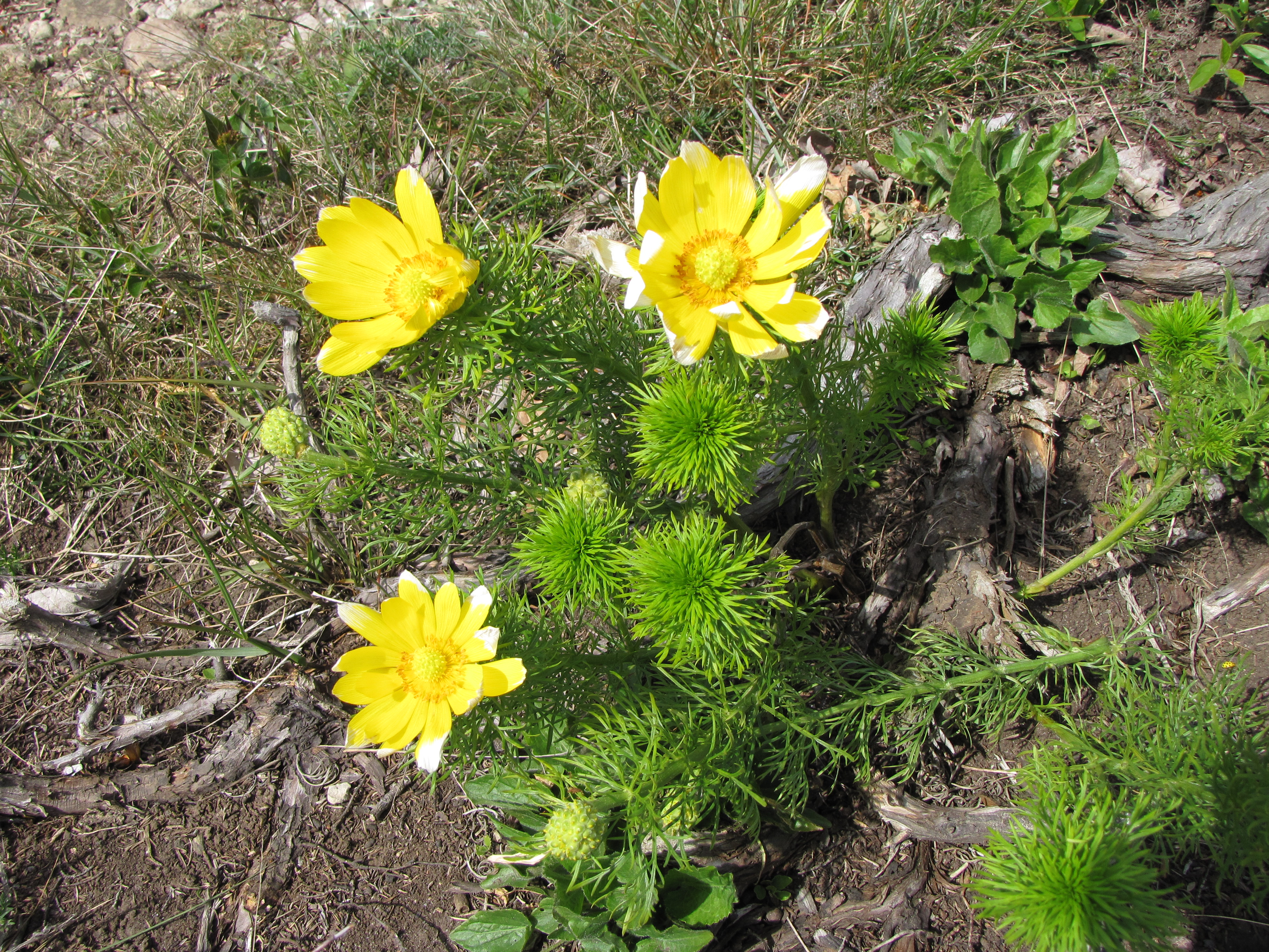 Våradonis förekommer på Gotland och Öland.